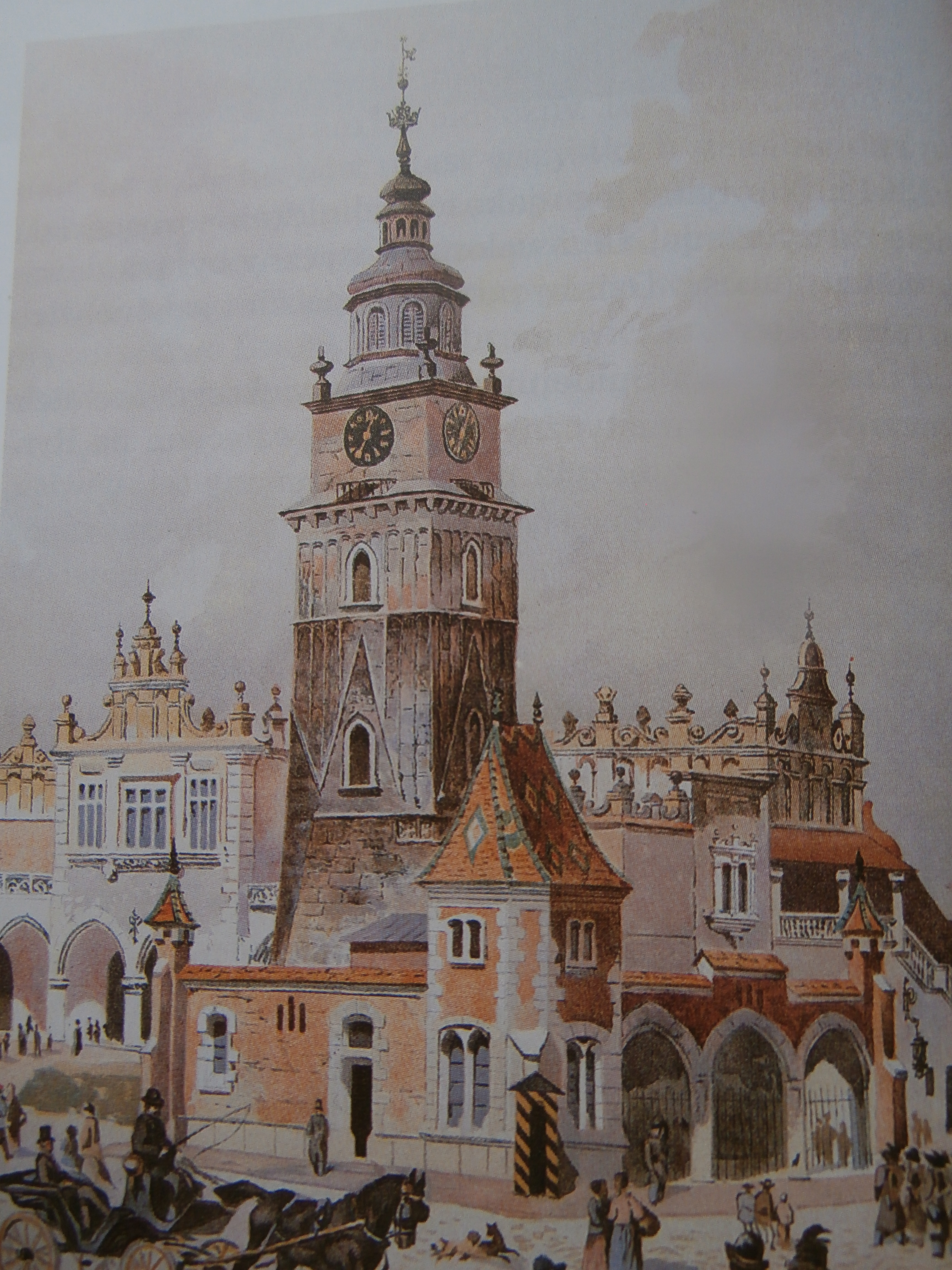 Wieża byłego ratusza miejskiego - mal. Stanisław Tondos